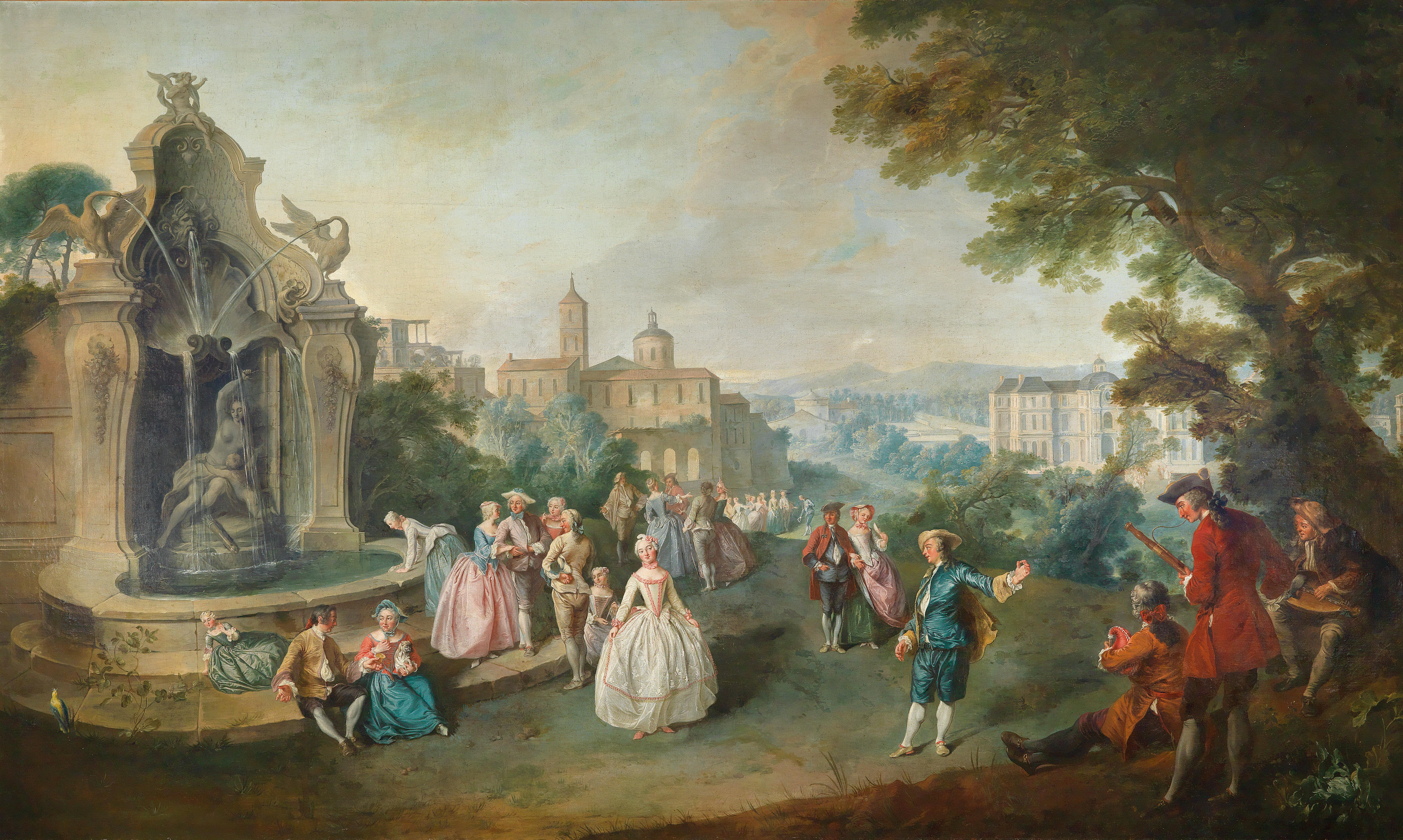 Eine elegante Gesellschaft an einem Brunnen vor dem Hintergrund eines Schlosses, Öl auf Leinwand, 170 x 284 cm Provenienz: Möglicherweise beauftragt von Prince Victor I Amedeo von Savoyen-Carignan für das Speisezimmer des Hôtel de Soissons in Paris; Privatsammlung, Spanien